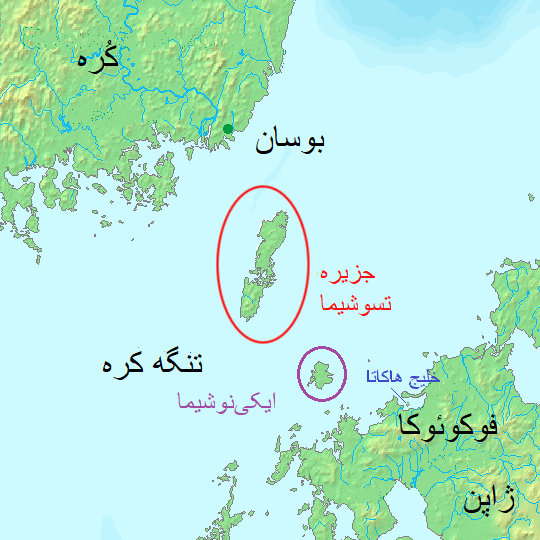 ترجمه نقشه به فارسی